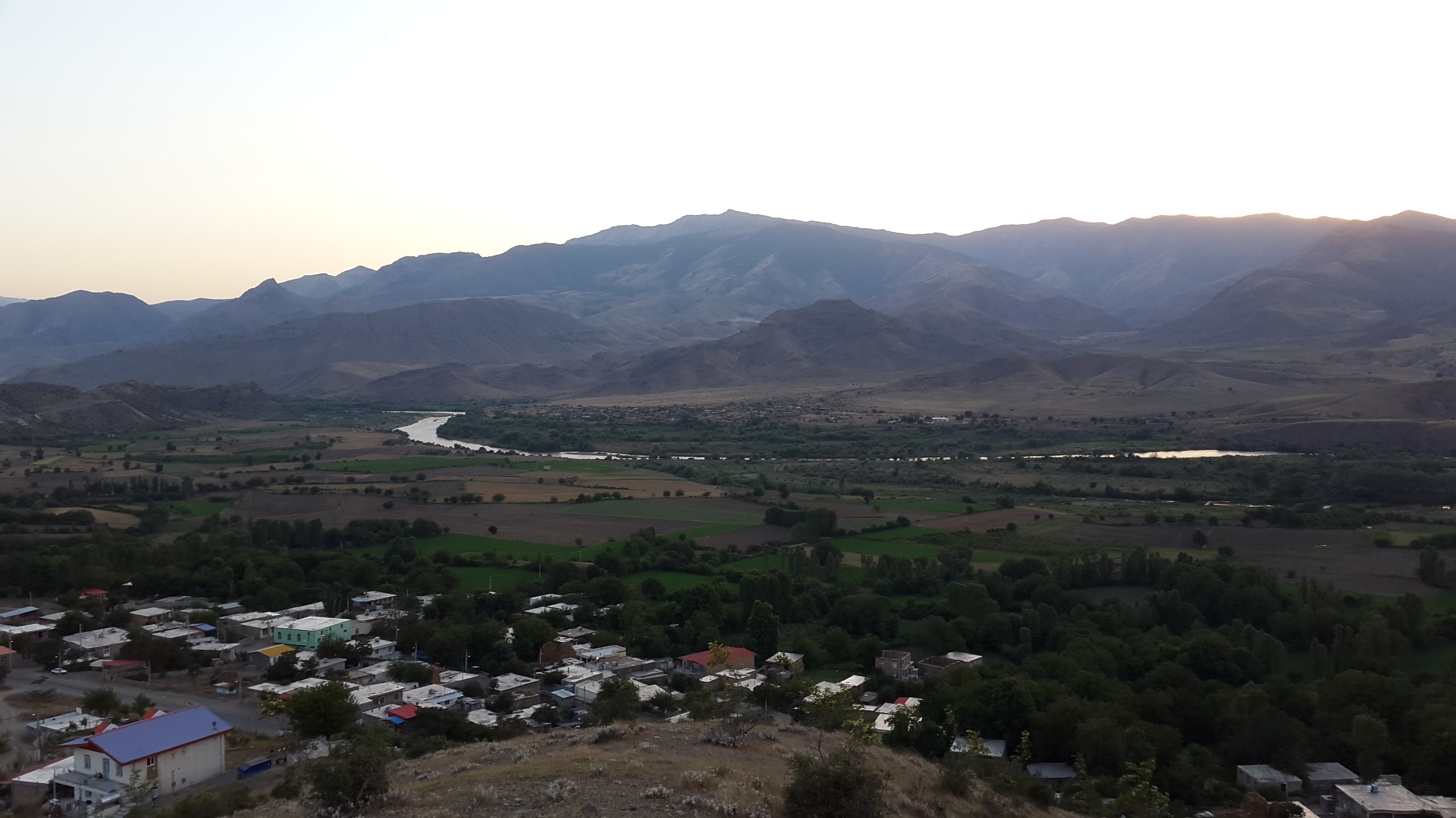 ابراهیم سمی